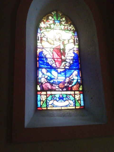 Ce vitrail représente la résurrection de Jésus.